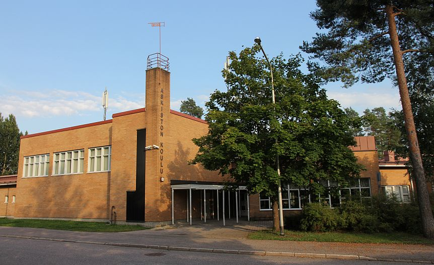 Vantaan Askiston koulua. Huom: Muista säilyttää viittaus kuvaajaan, mikäli käytät kuvaa.